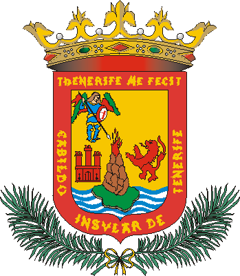 Escudo del Cabildo Insular de Tenerife, en la provincia de Santa Cruz de Tenerife (España)